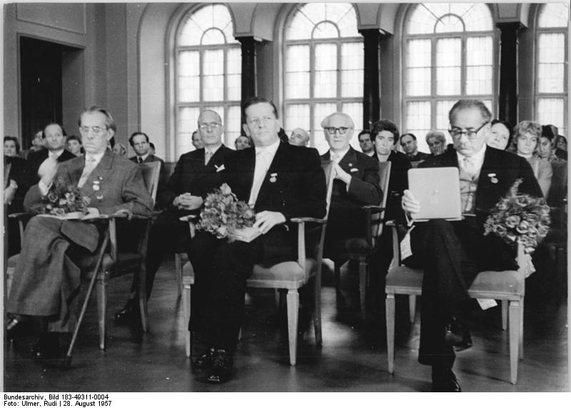 Berlin, Goethepreis an Nagel, Busse, Wisten Zentralbild Ulmer 28.8.1957 Goethepreis der Stadt Berlin verliehen Am 28.8.1957 wurde im Sitzungssaal des Abgeordnetenkabinetts des Rathauses Berlin an drei verdiente Bürger der Stadt Berlin der Goethepreis 1957 verliehen. Sie erhielten aus der Hand des amtierenden Oberbürgermeisters Waldemar Schmidt die hohe Auszeichnung. UBz: Die Goethepreisträger 1957 vlnr: Professor Otto Nagel, Ing. Gerhard Busse, Intendant Fritz Wisten. Abgebildete Personen: Nagel, Otto Prof.: Maler, Präsident der Akademie der Künste (AdK), Nationalpreisträger, Vaterländischer Verdienstorden (VVO) in Gold, DDR (PND 118586300) Busse, Gerhard Ing.: Direktor im VEB Industriebau, Goethe-Preis1957, DDR Wisten, Fritz: Intendant der Volksbühne Berlin, Nationalpreis 1952, DDR